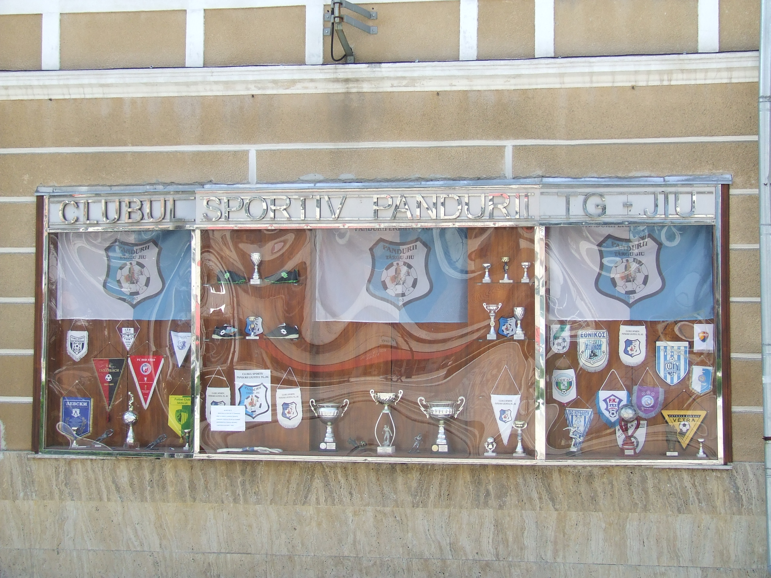 Panou cupe Pandurii Târgu-Jiu, în centrul orașului Poza facuta cu aparatul FUJIFILM Model - FinePix S5600 la 2006:04:21 13:56:47 EEST (detalii in antetul EXIF)